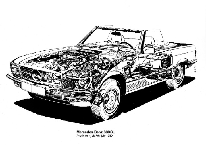 Mercedes-Benz_380_SL_Phantombild